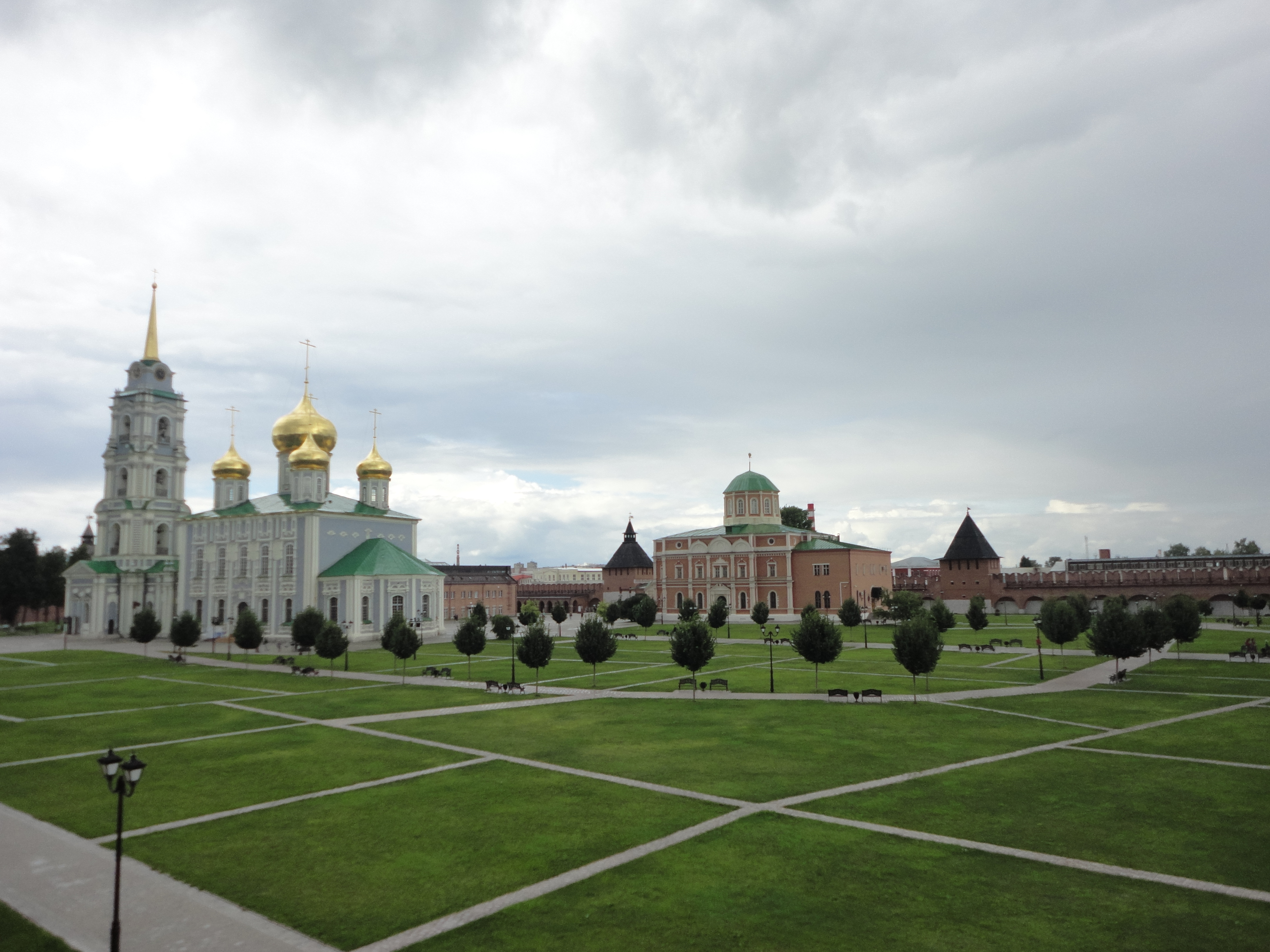 Тульский кремль: Кремль, Тула, Тульская область